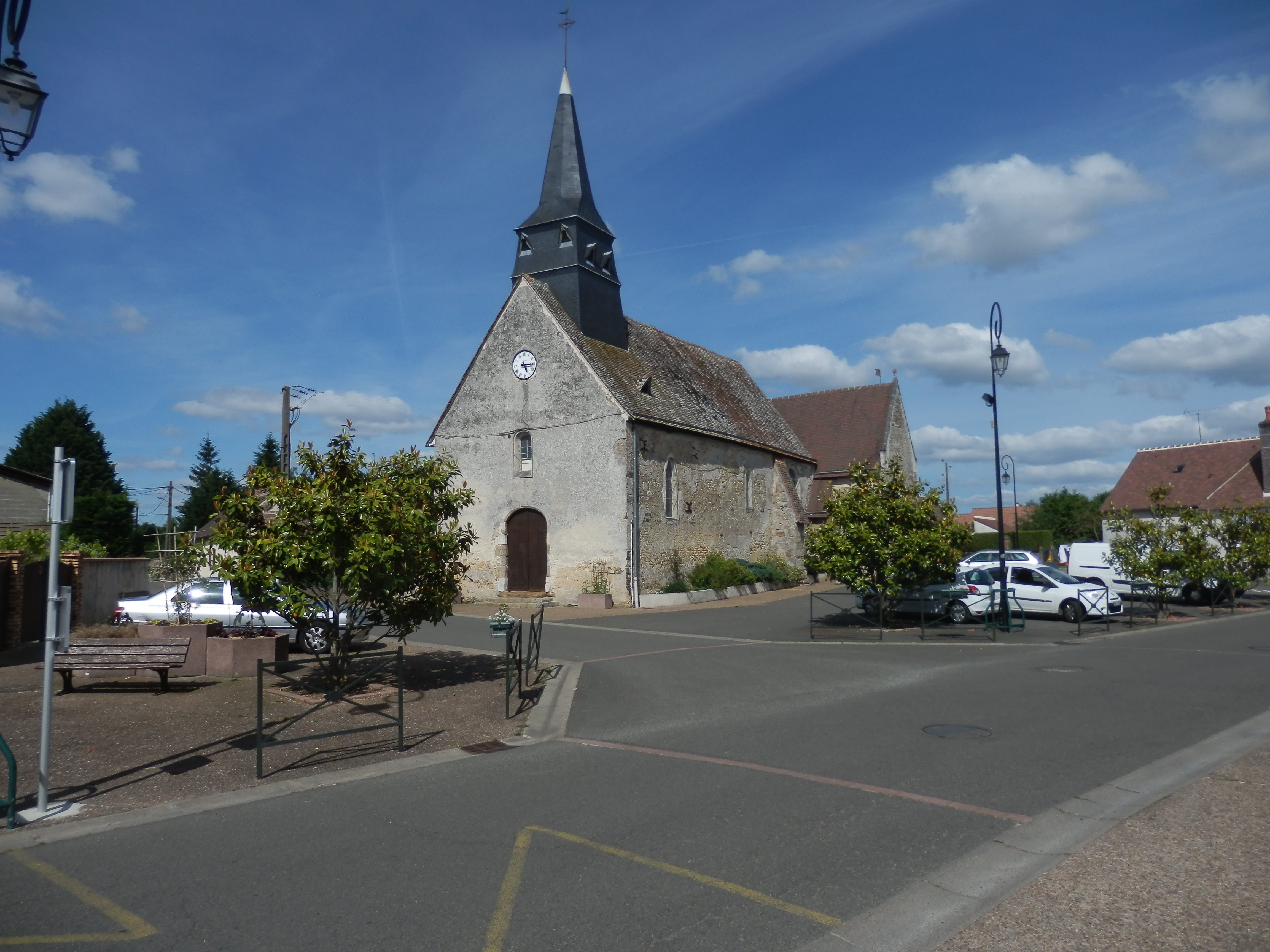 Église Saint-Vincent de Volnay.